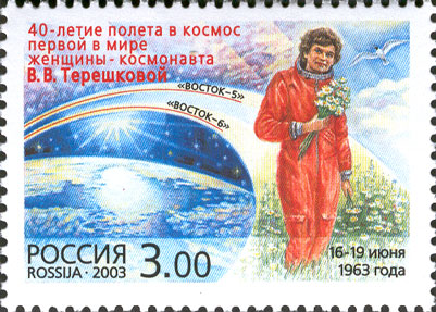 Почтовая марка России - Терешкова Валентина Владимировна, Герой Советского Союза